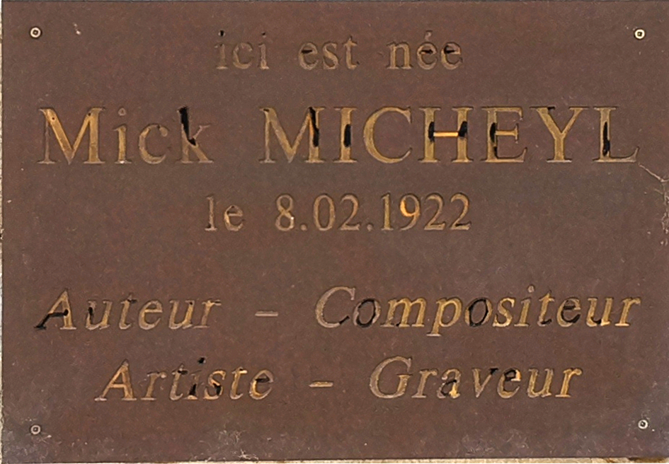 Plaque "Ici est née Mick Mickeyl" au 201 Rue Vendôme à Lyon. recto in engraving: ici est née Mick MICHEYL le 8.02.1922 Auteur - Compositeur Artiste - Graveur